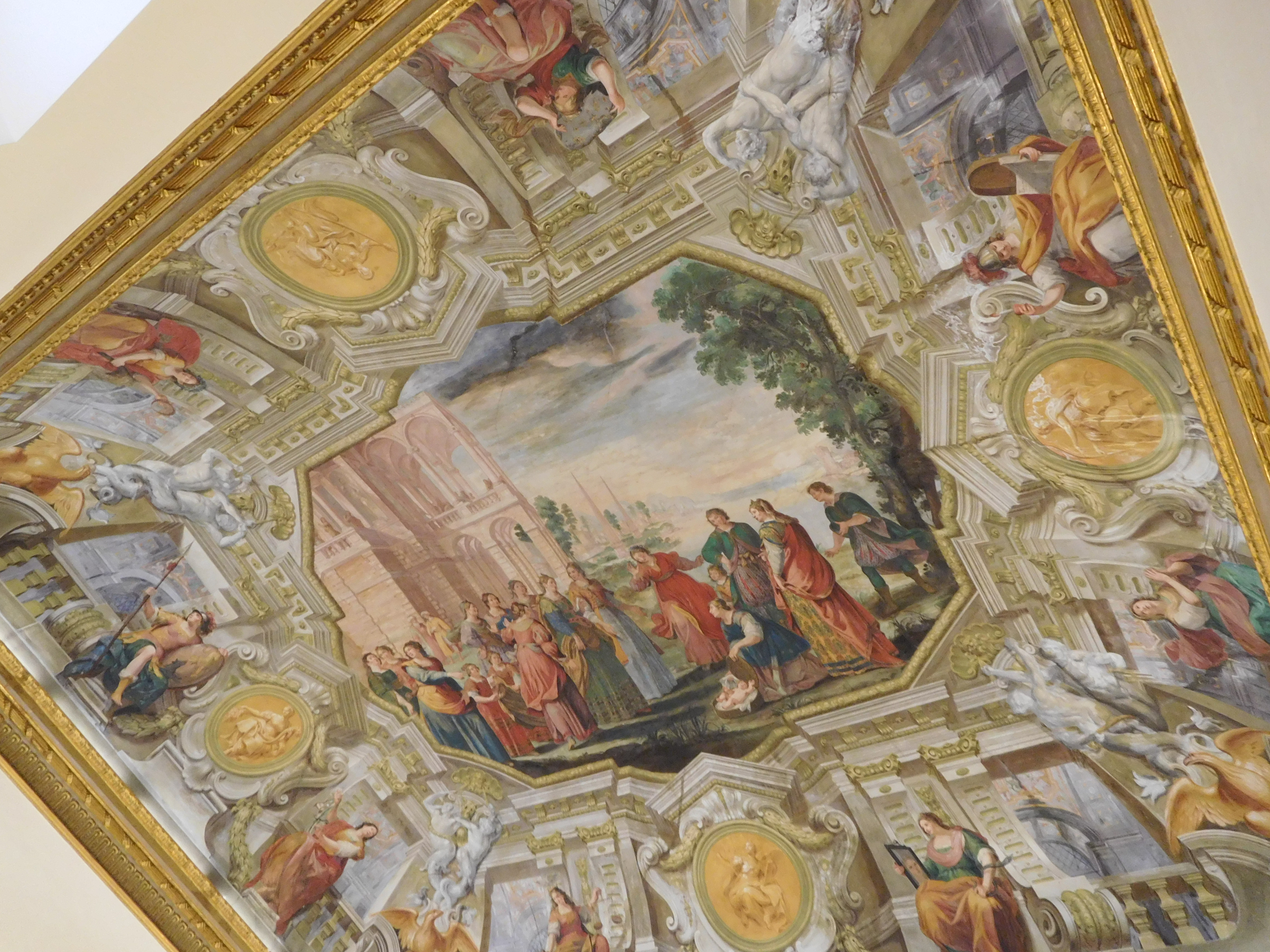 Palazzo Agostino Spinola (o Palazzo Doria De Ferrari), Genova